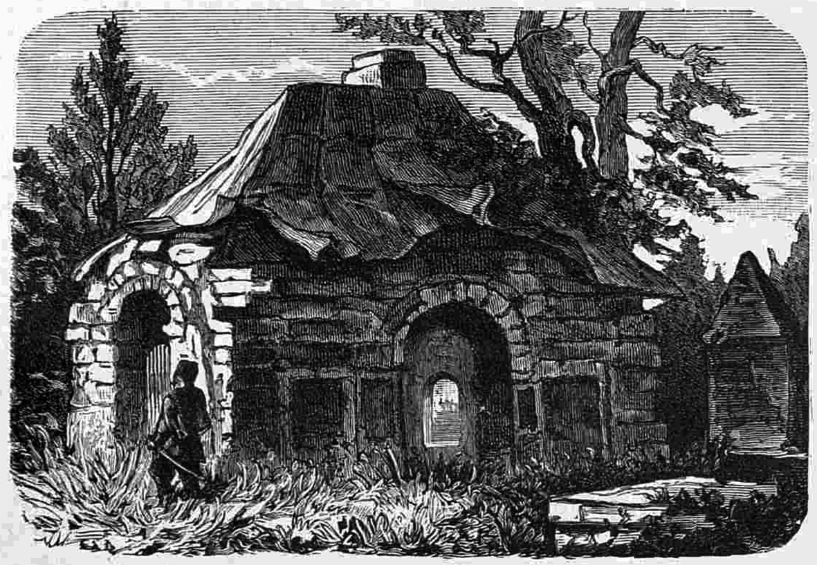 Руїни дому Мазепи в Батурині.